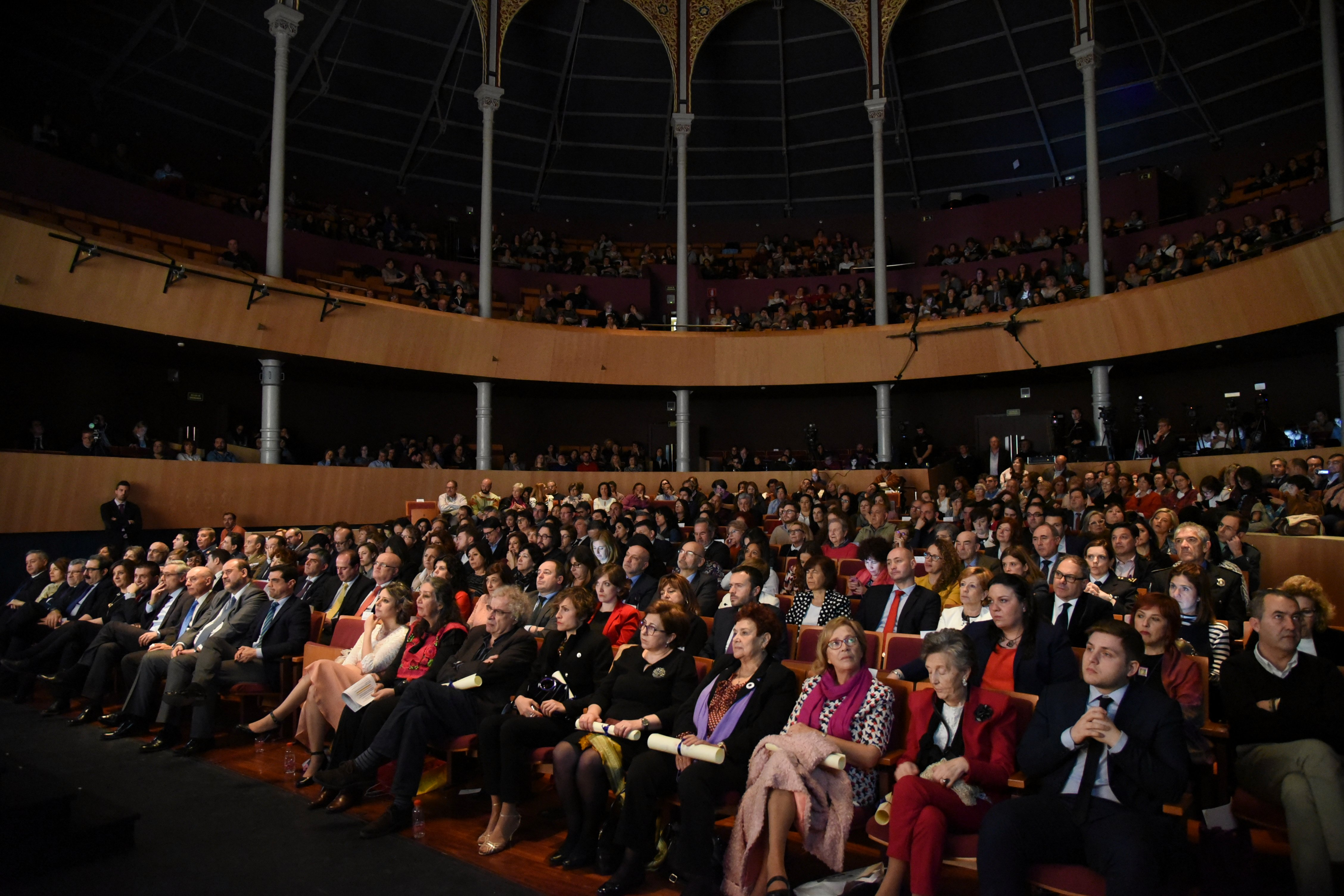 Gradas del Teatro Circo de Albacete